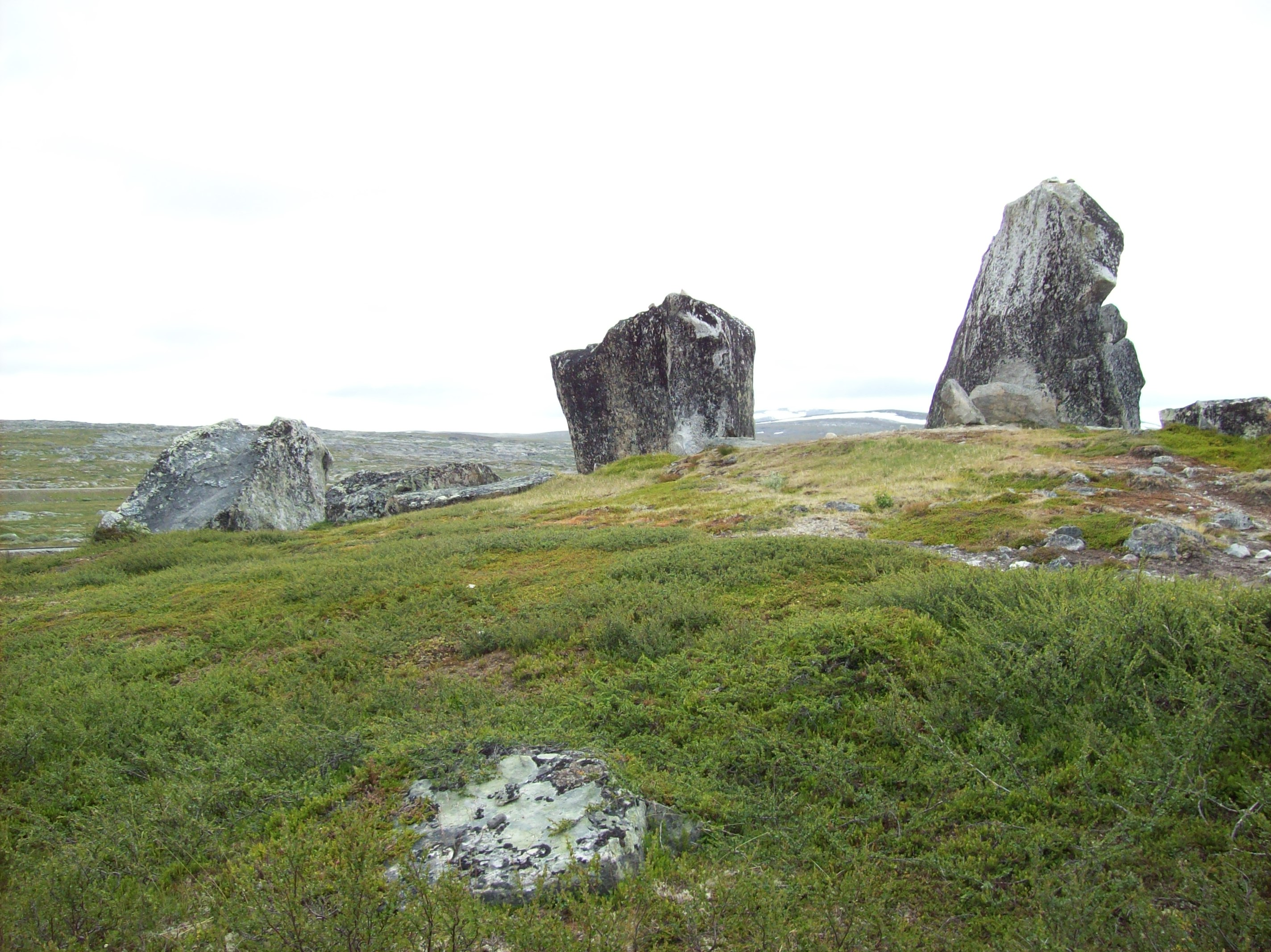 Sieidi ved Stødi på Saltfjellet.